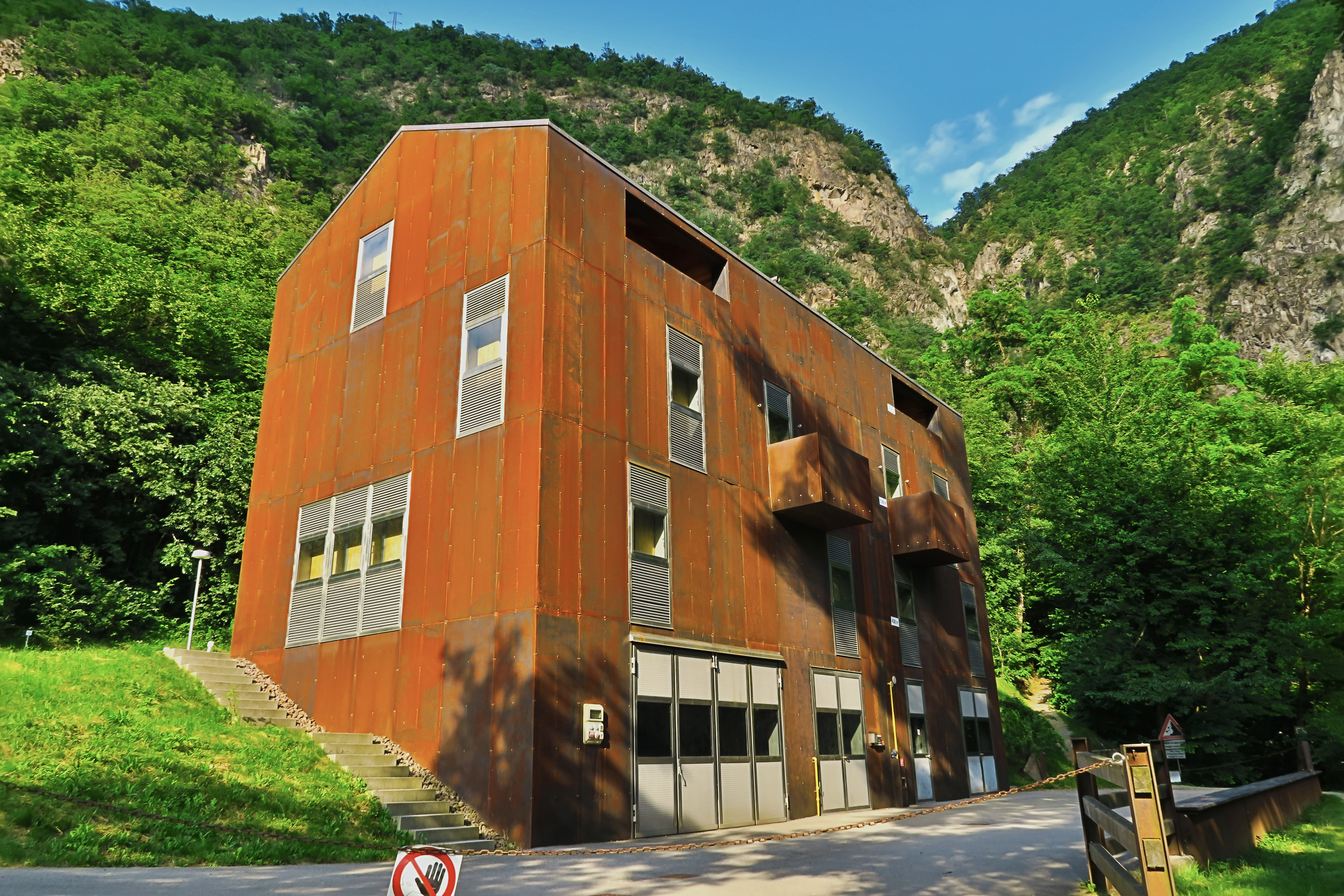 Italien, Südtirol, Terlan, Vilpian: Landesfeuerwehrschule, Brandübungshaus